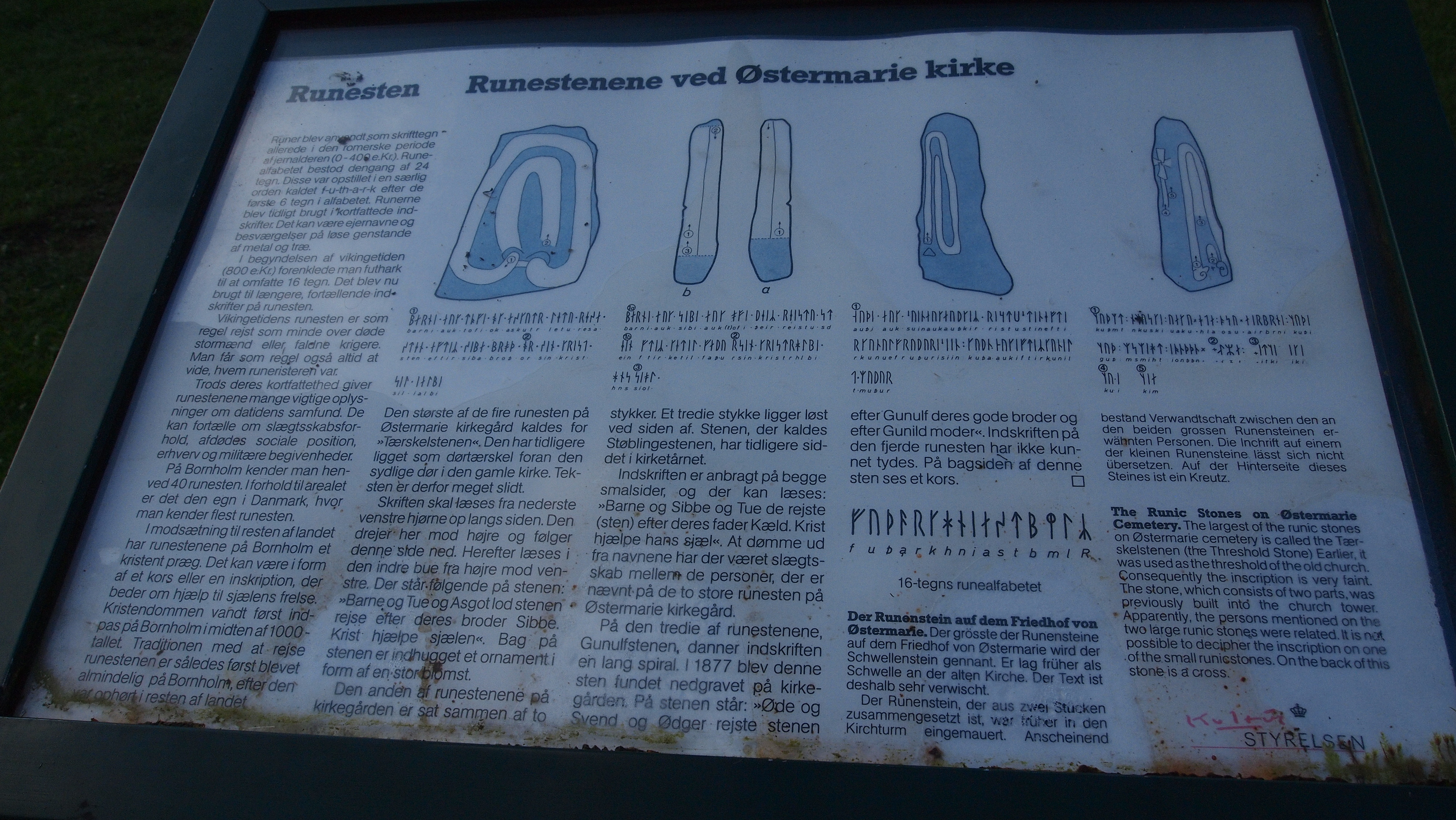 Information om de fire runestene ved Østermarie kirkeruin.